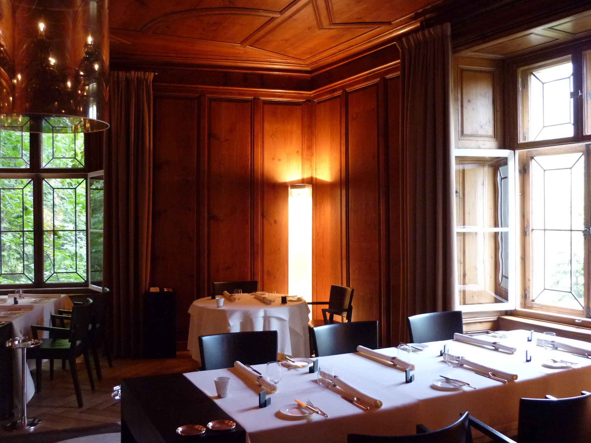 Schloss Schauenstein, Fürstenau GR, Schweiz